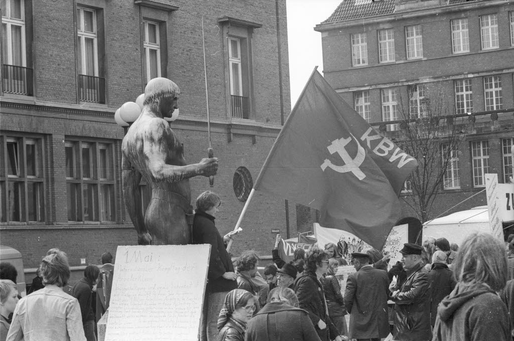 Unter den ca. 1.500 Versammelten sind auch zahlreiche Angehörige kommunistischer Gruppierungen mit Fahnen und Transparenten. Hier eine Fahne des Kommunistischen Bundes Westdeutschland (KBW).